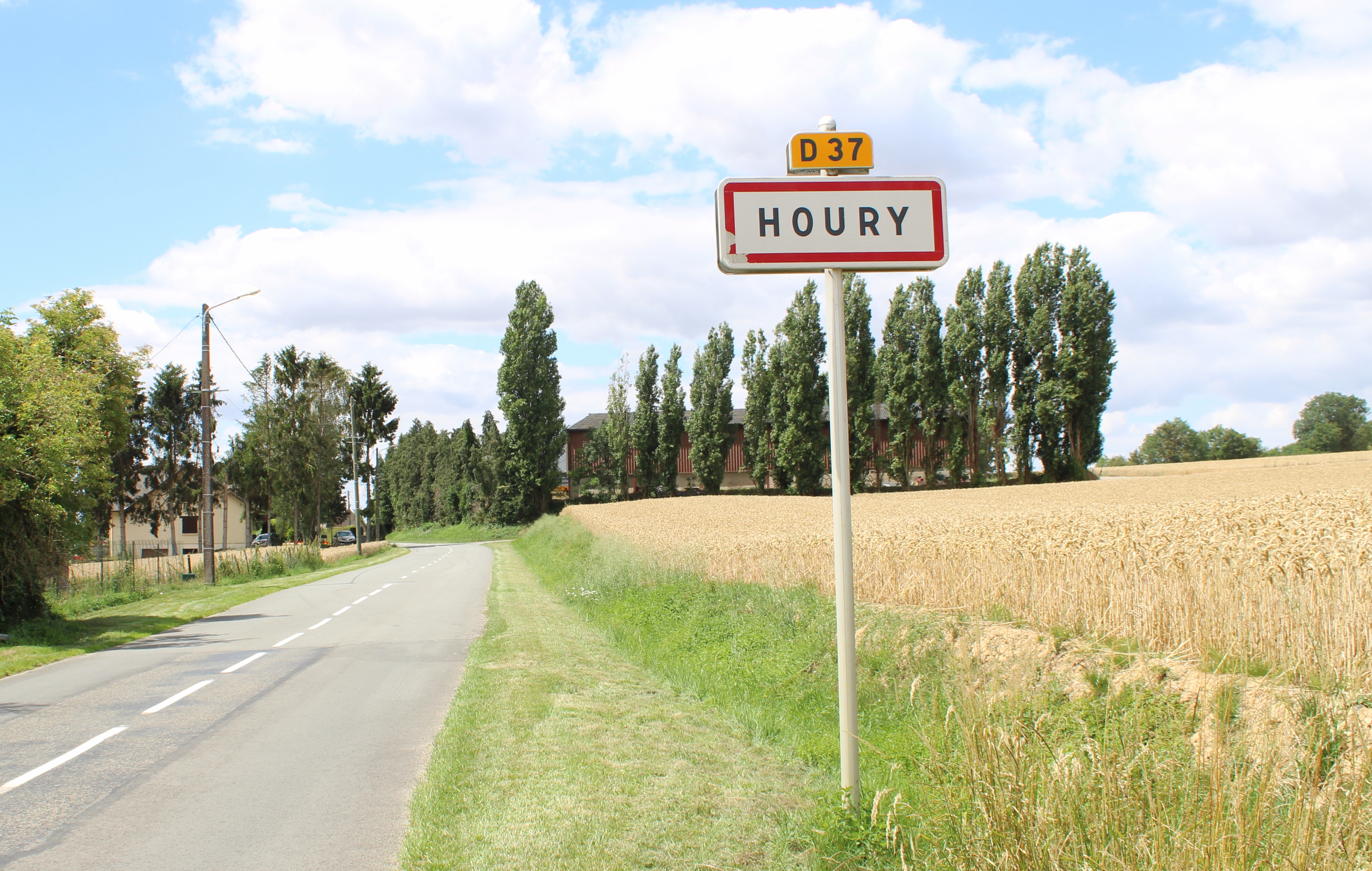 Entrée du village